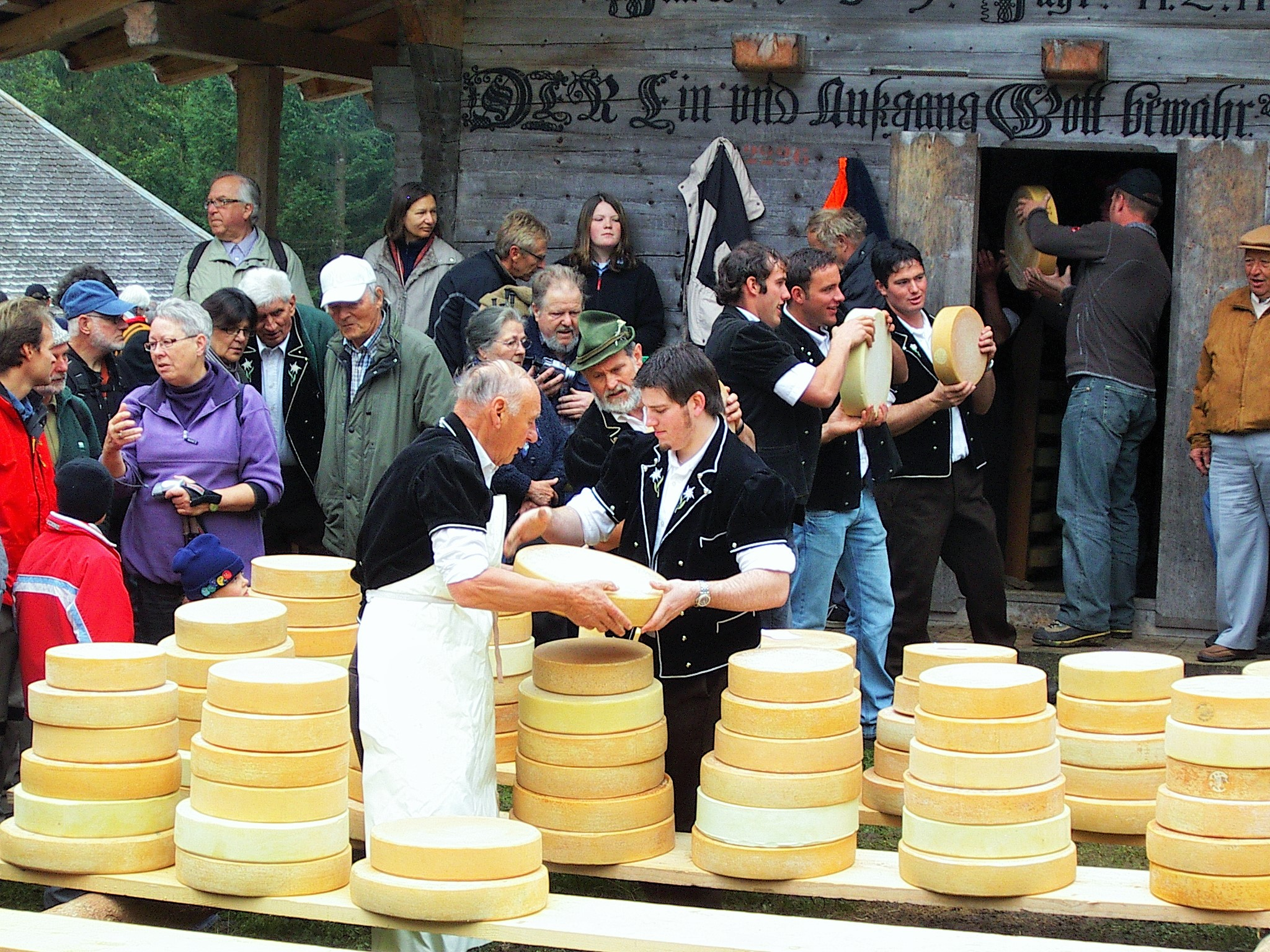 Chästeilet Justistal BE, Schweiz